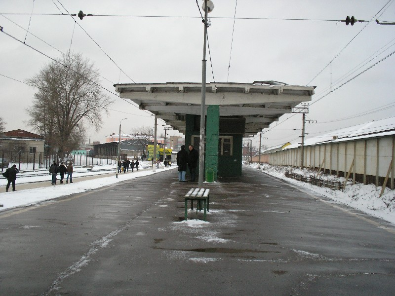 платф.Савёловская